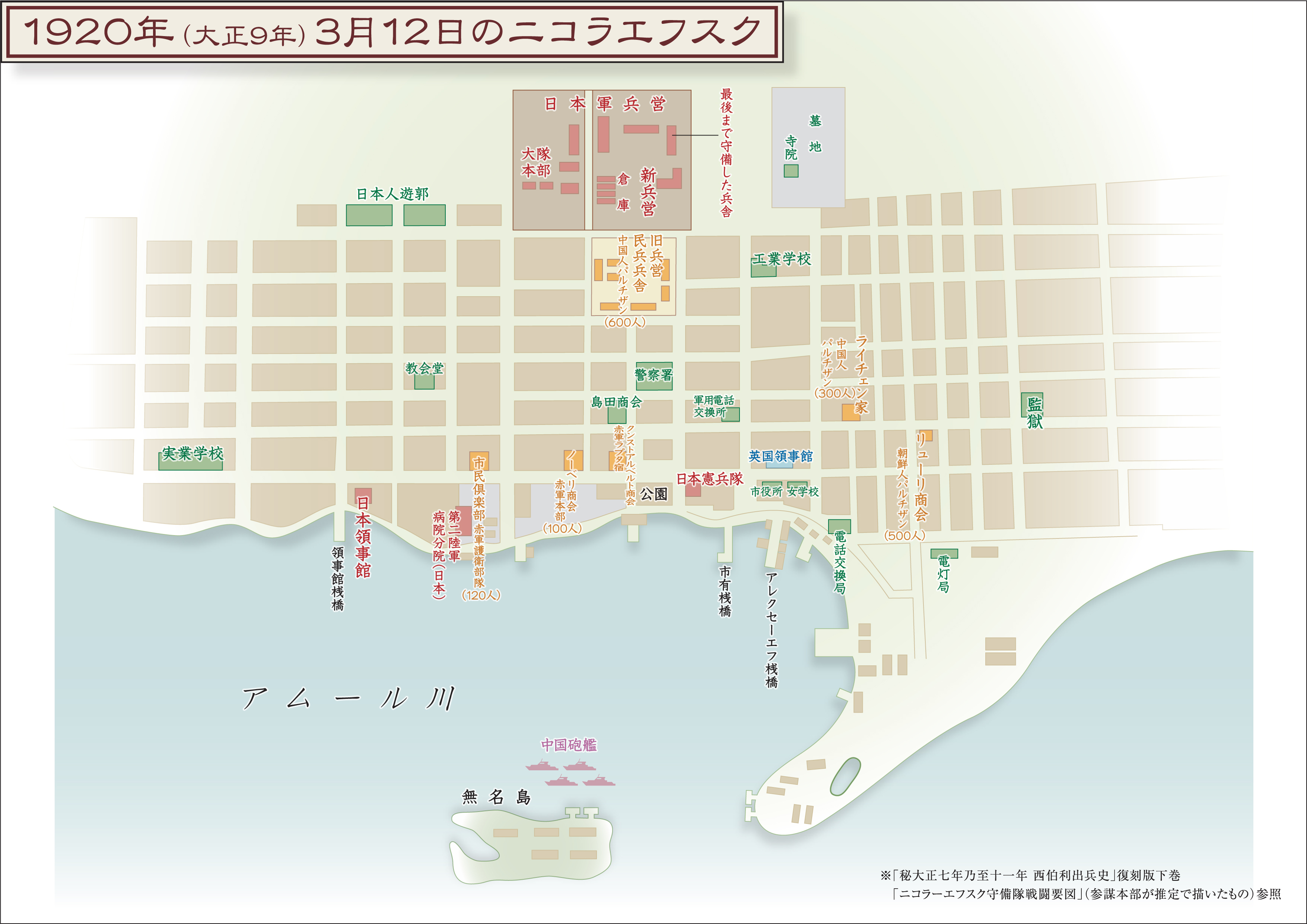 日本軍が決起した当日のニコラエフスクの図。参謀本部編「西伯利出兵史」参照。